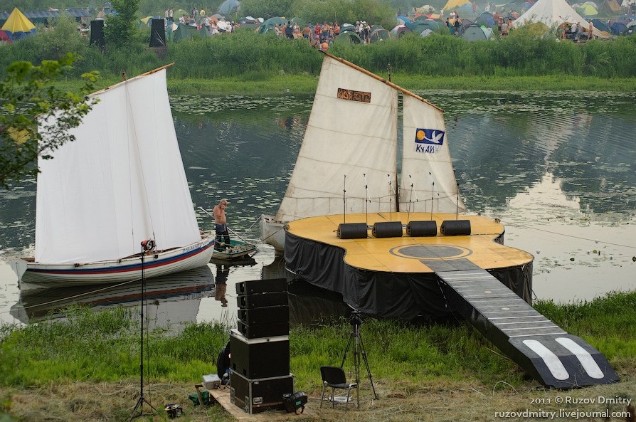 Главная сцена Грушинского фестиваля 2011 в традиционной форме гитары